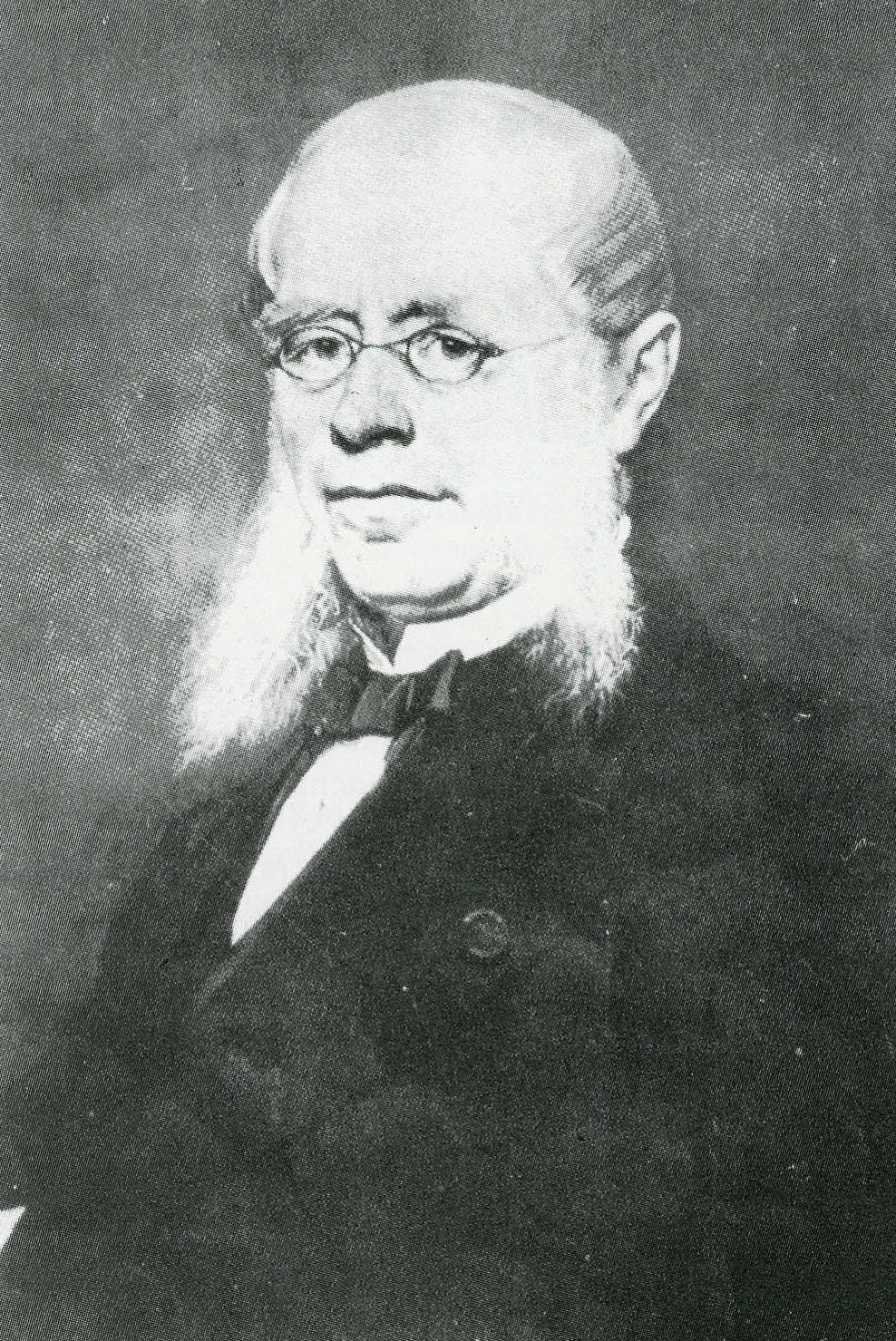 Thomas Braun Sr geboren in Kommern in Duitsland - vader van Emile, de burgemeester van Gent (Belgie) en volksvertegenwoordiger: Emile Braun. Thomas was ook schooldirecteur in Nijvel (Nivelles)